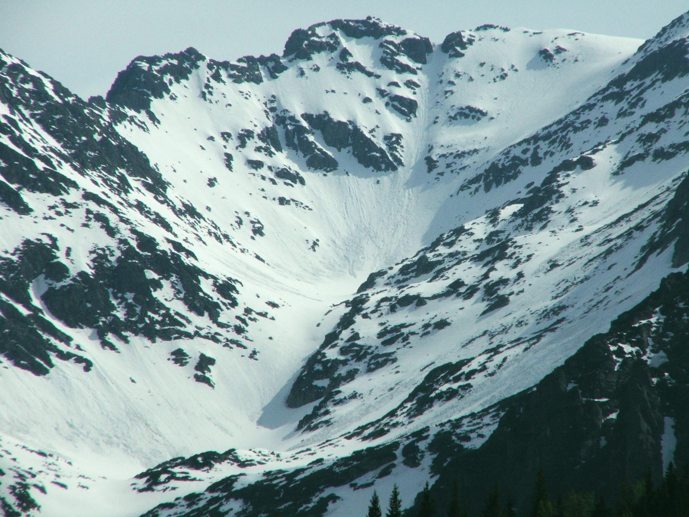 Wołoszyn (Tatra Mountains - widok z Gęsiej Szyi (zbliżenie, 14 czerwiec 2006 r.)